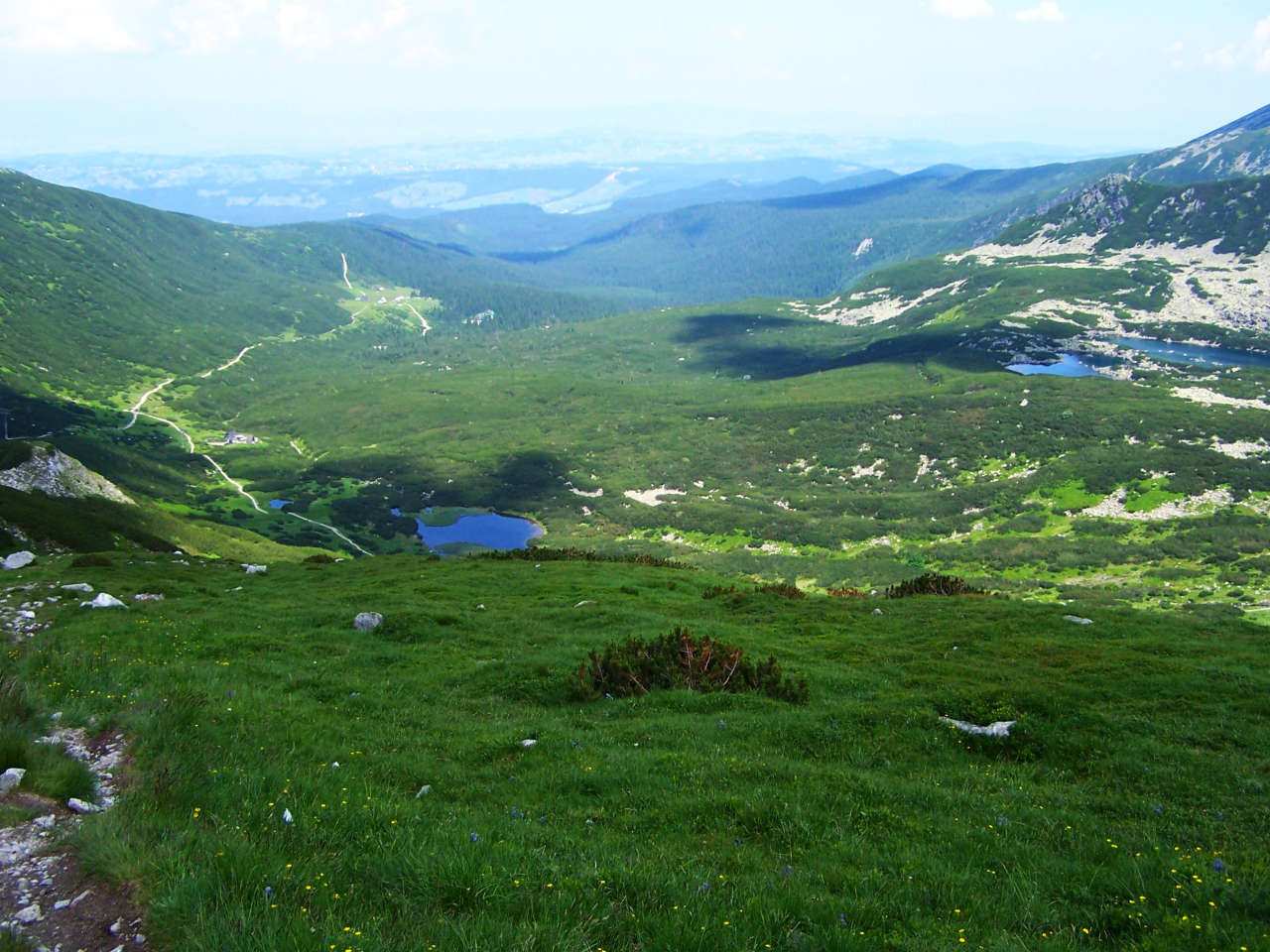 Dolina Gąsienicowa (Tatra Mountains)